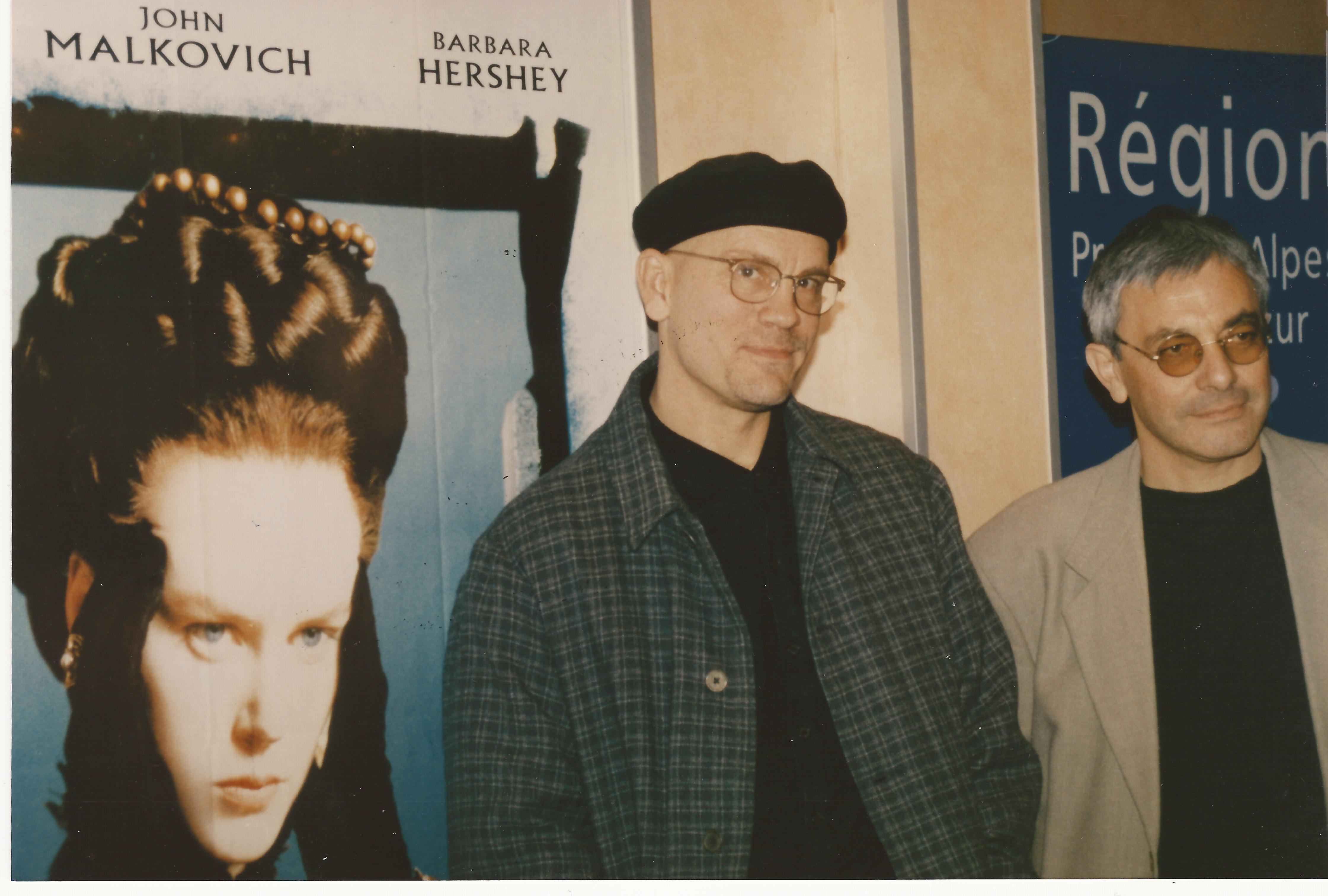 Charles Villani , Directeur du Festival des Passions d'Aubagne reçoit John Malkovich